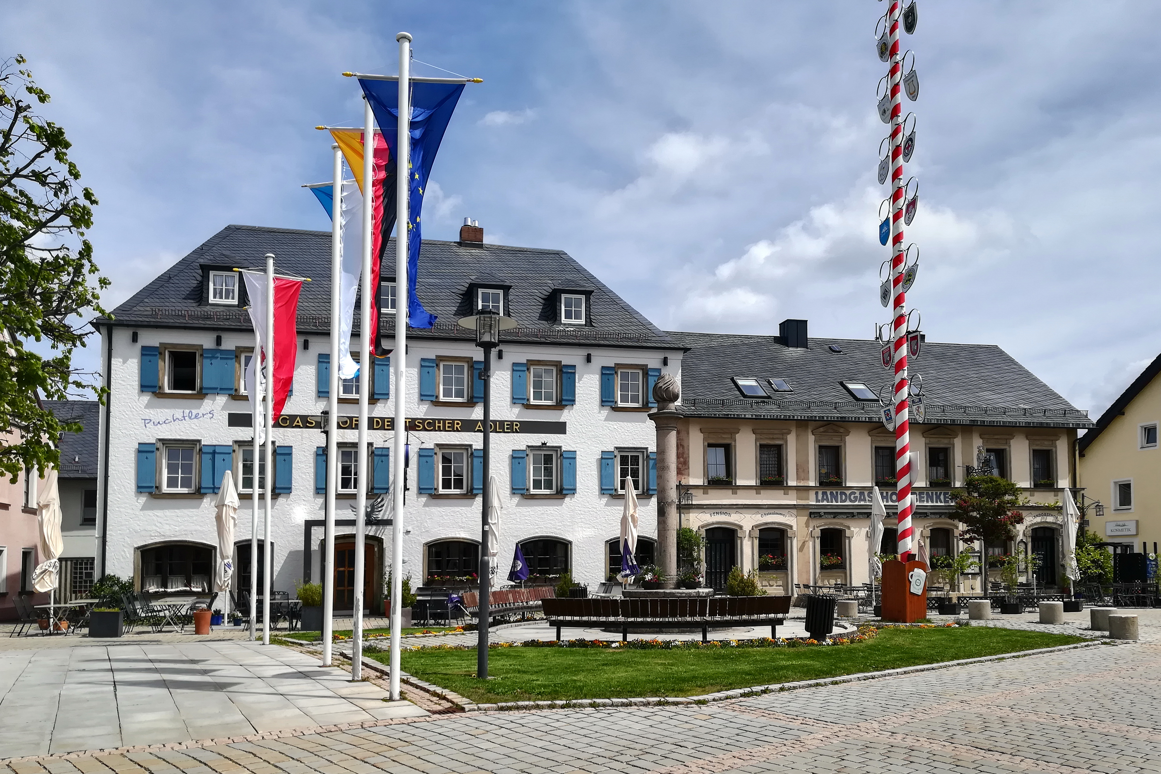 Granitsäule mit ewiger Flamme, bezeichnet „1923“ von Hans Reissinger.